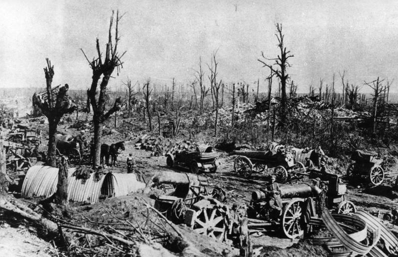 Die große Schlacht im Westen. Eine Batterie deutscher 21 cm-Mörser im Kampfgelände zwischen Bapaume - Arras.